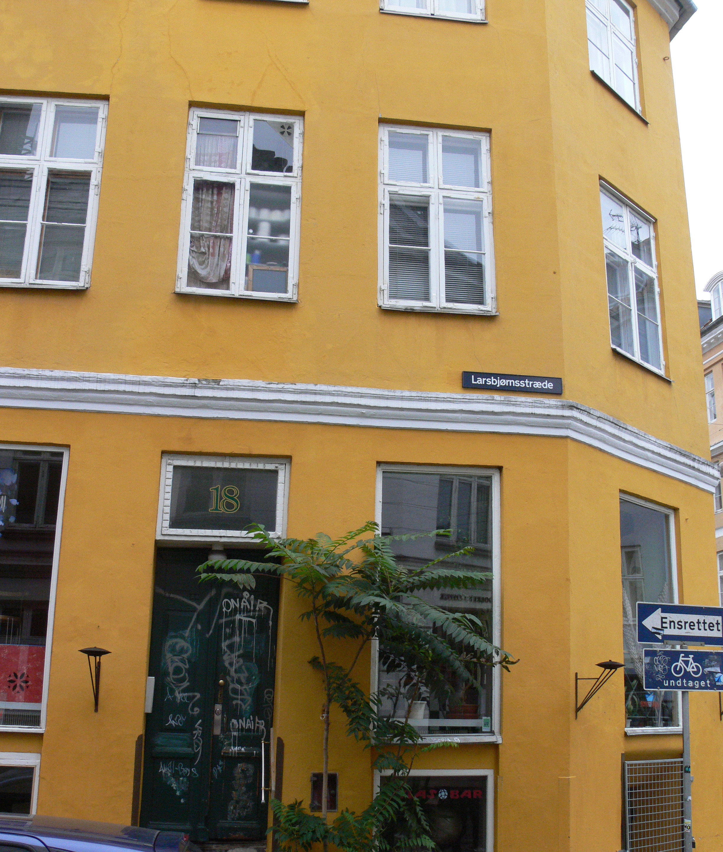 Hier wohnte im 1. Stock der Goldschmied Heidenreich. Er hatte goldene Luren aus der Bronzezeit gestohlen, eingeschmolzen und zu Schmuck verarbeitet. Er wurde zu 37 Jahren Gefängnis verurteilt.